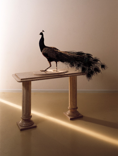 Sculpture